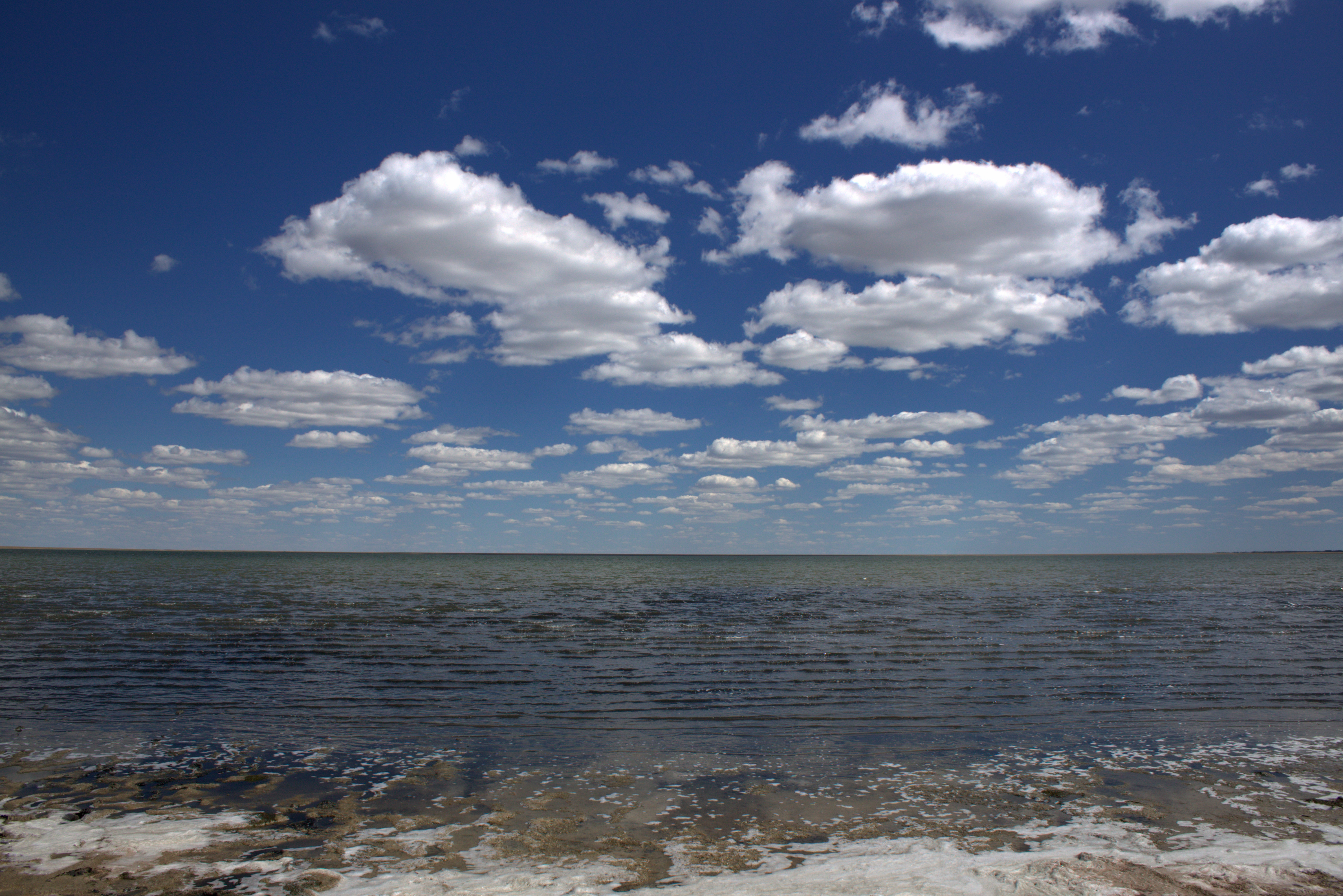 Озеро Ульжай летом 2010 года